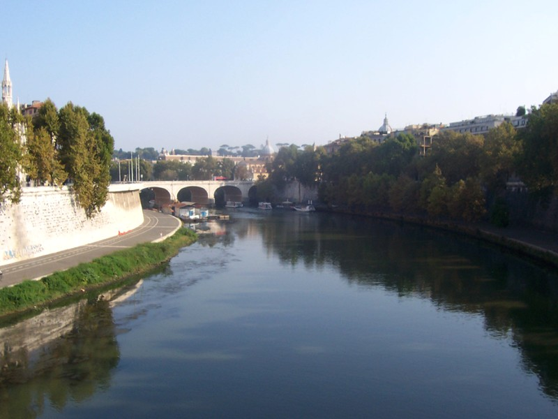 Roma - Fiume Tevere visto da Ponte Umberto I